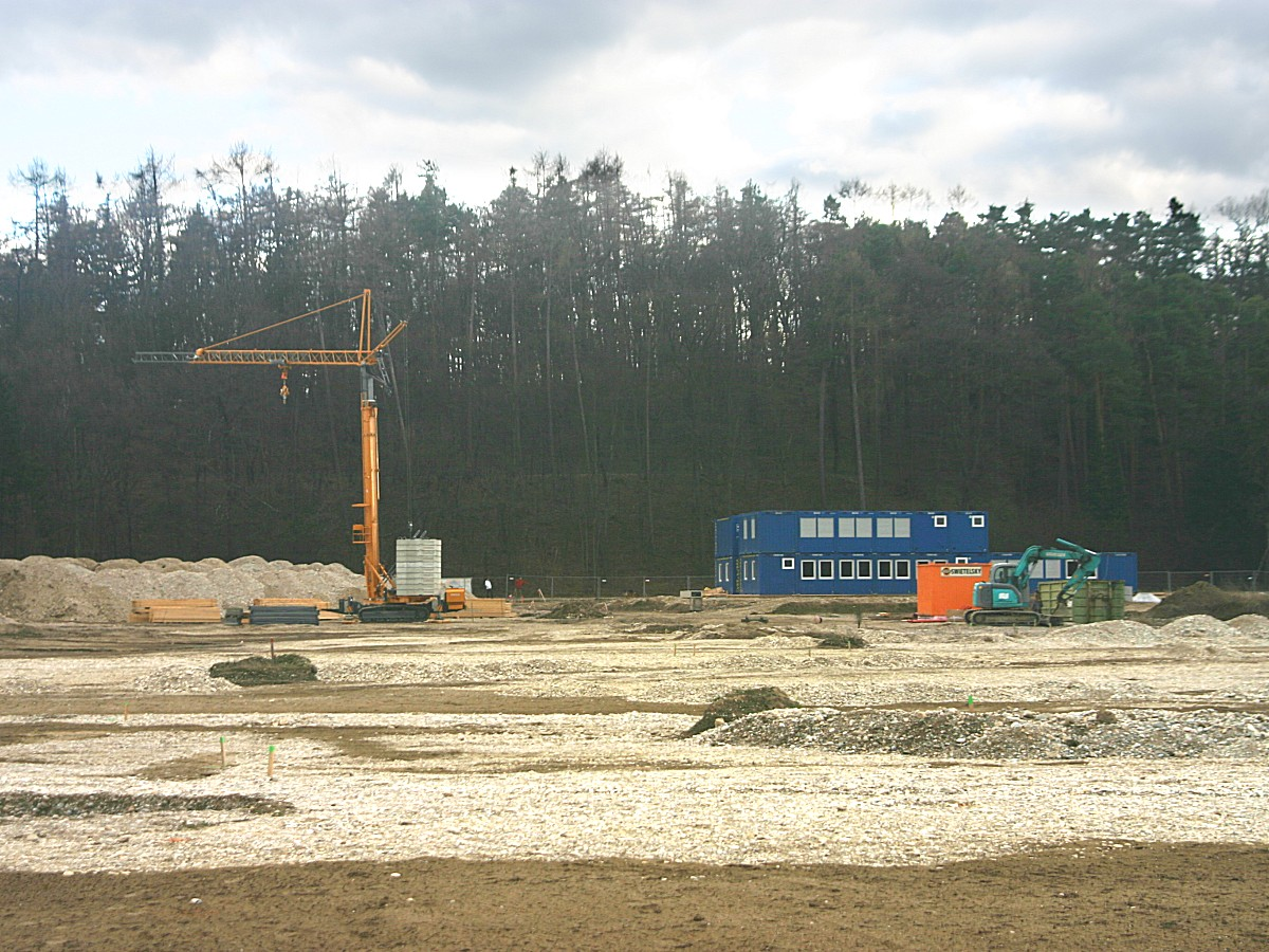 Erlach (Niederösterreich) Thermenbaustelle Linsberg (Bild 1)